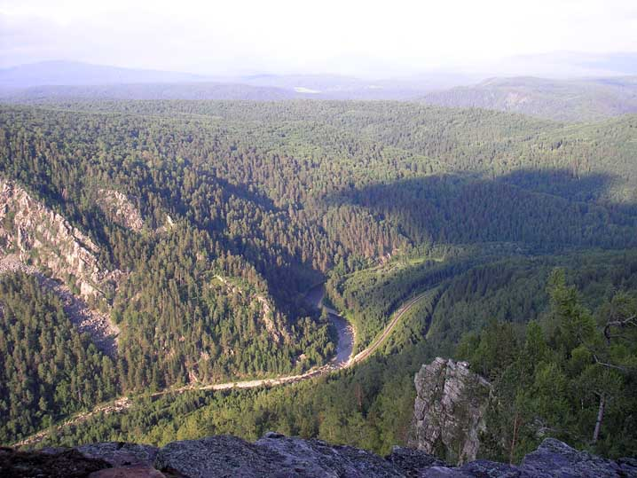 хребет Караташ This image is related to the protected area of Russia number 0210201